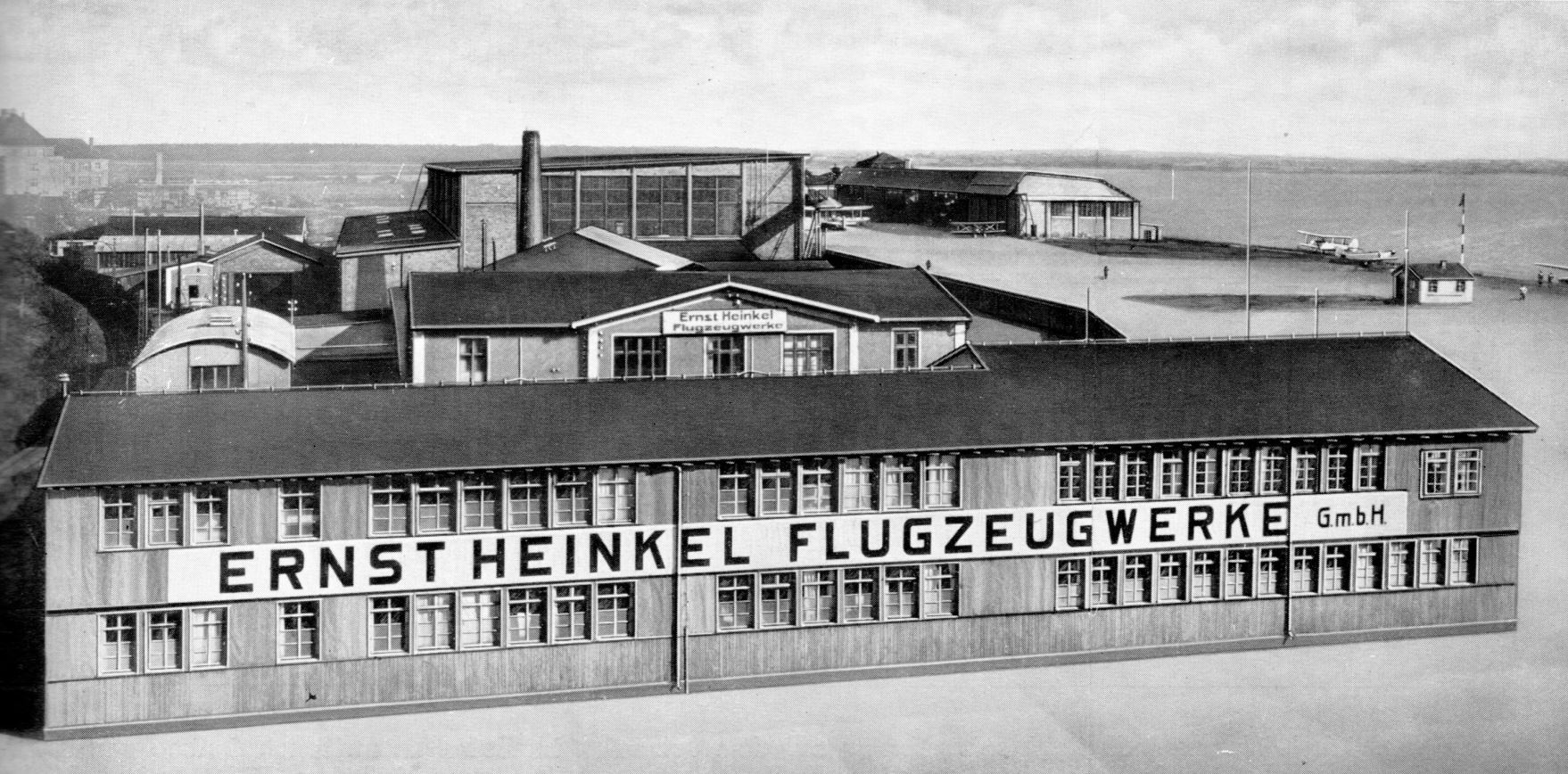 Die zweite Betriebstätte der Ernst Heinkel Flugzeugwerke in Rostock, war bis zum Bau der Hallen am heutigen Werftdreieck, in Warnemünde lokalisiert, genauer Hohe Düne an der Nordseite des Breitlings. Auf dem Gelände ist heute die Marine ansässig. Aufnahme ist auch von ca. 1930.